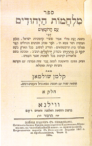 שער הספר "תולדות מלחמת היהודים עם הרומאים", בתרגומו של קלמן שולמן, וילנה תרכ"ג.